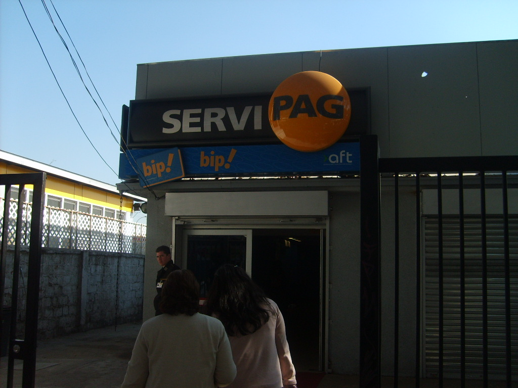 Foto de la entrada del Centro Bip! de Macul con Grecia